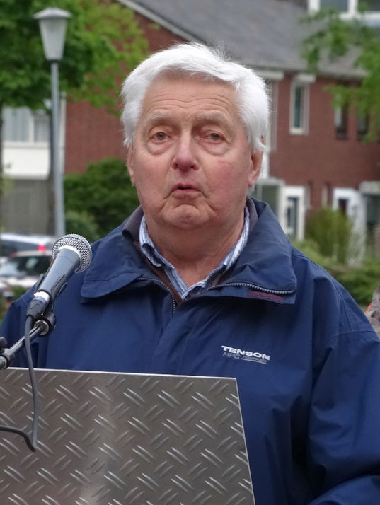 Publicist Harm van der Veen houdt een toespraak bij de onthulling van het vernieuwde verzetsmonument in Wildervank.